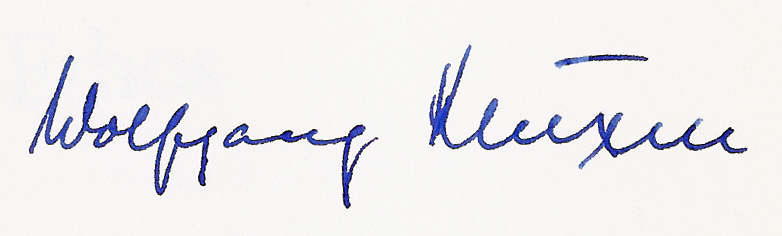 Seine Signatur vom 7.10.74. im mir an diesem Tag überreichten Exemplar seines Buches »Ethik des Ethos«.